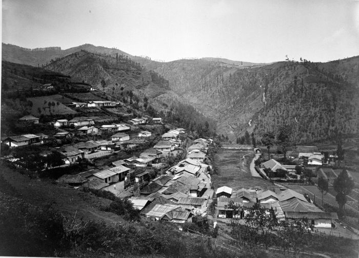 Foto. De kampong Tosari in het Tengger gebergte.